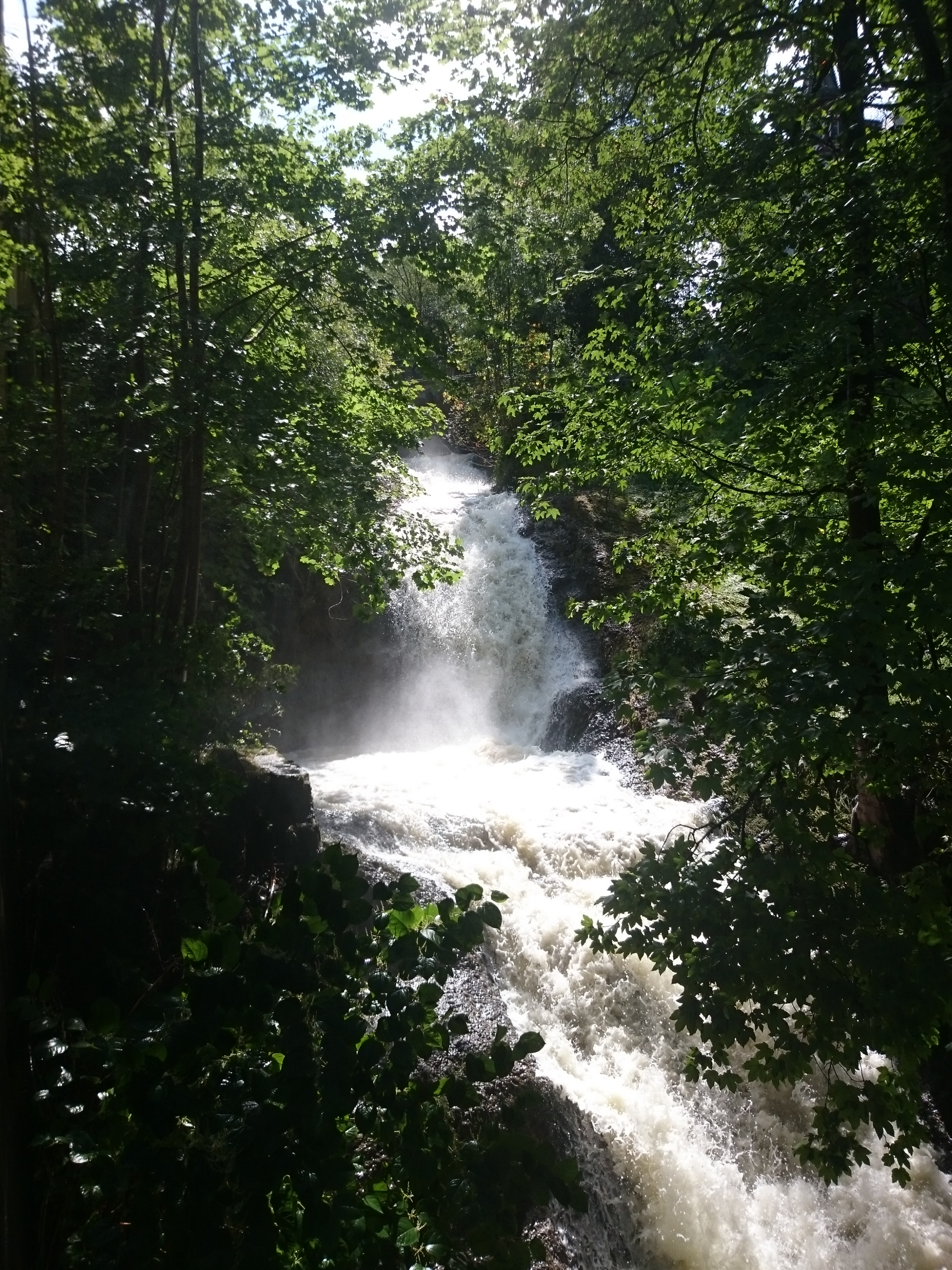 Ein Wasserfall der Mülenenschlucht direkt bei der Mühlegg in St. Georgen, St. Gallen